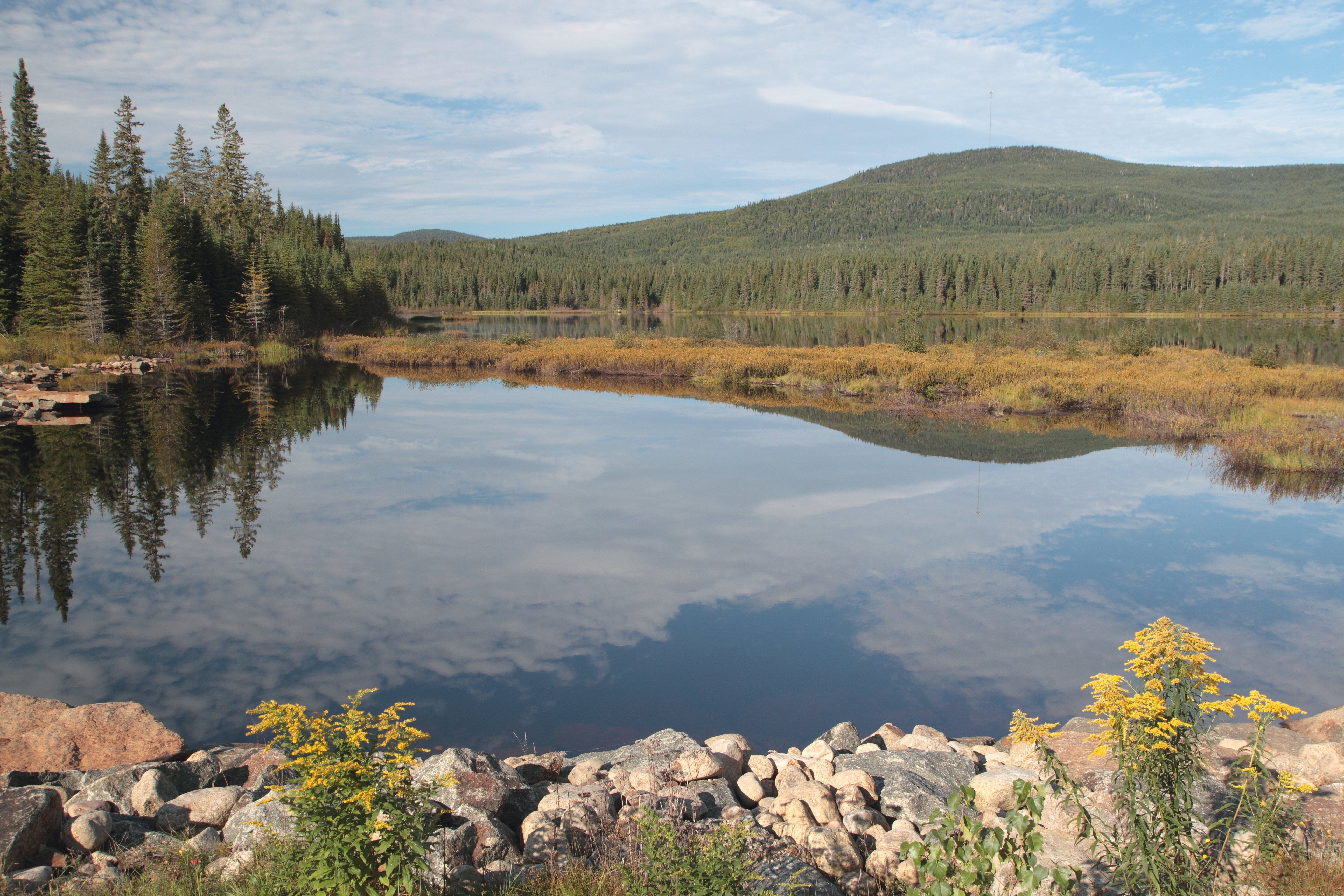 Lac Piché, Forêt Montmorency, Québec, Canada.